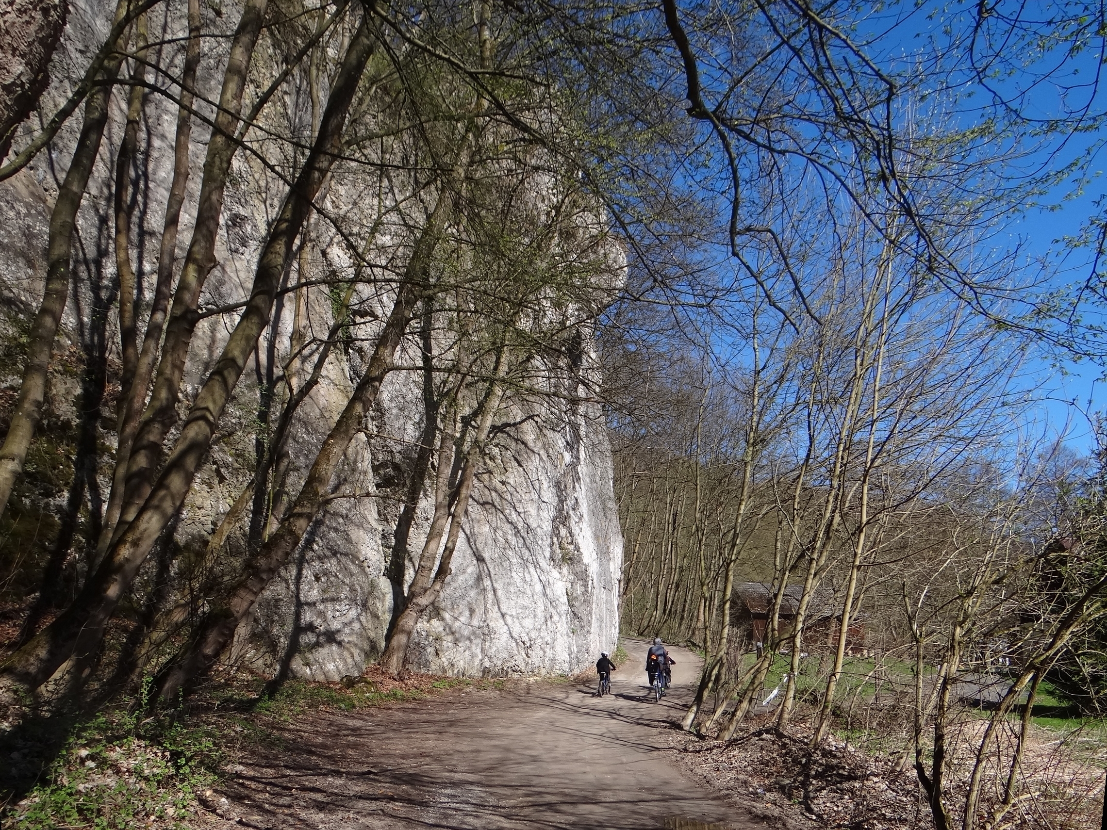 Skała Golanka w Ojcowskim Parku Narodowym